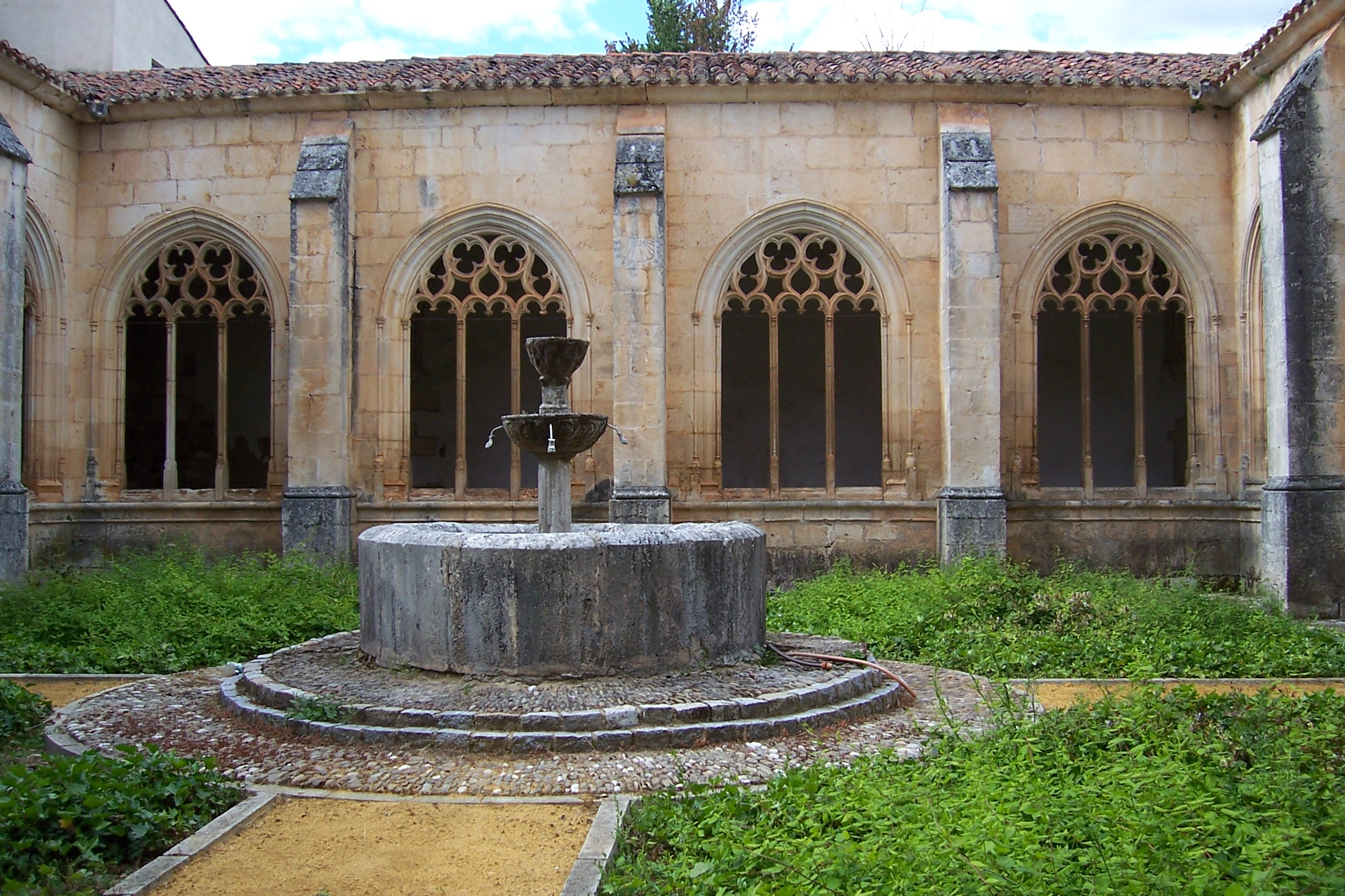 Colegiata de San Cosme y San Damián de Covarrubias (Burgos, España) Es un edificio tardogótico, cuyas obras empezaron en 1474 por encargo del abad Diego Fernández, capellán del rey Enrique IV. De elegantes proporciones y planta de cruz latina, con tres naves y crucero, acoge entre sus muros los panteones de numerosas familias ilustres de la villa. En la imagen, una vista del claustro con la fuente en el centro.